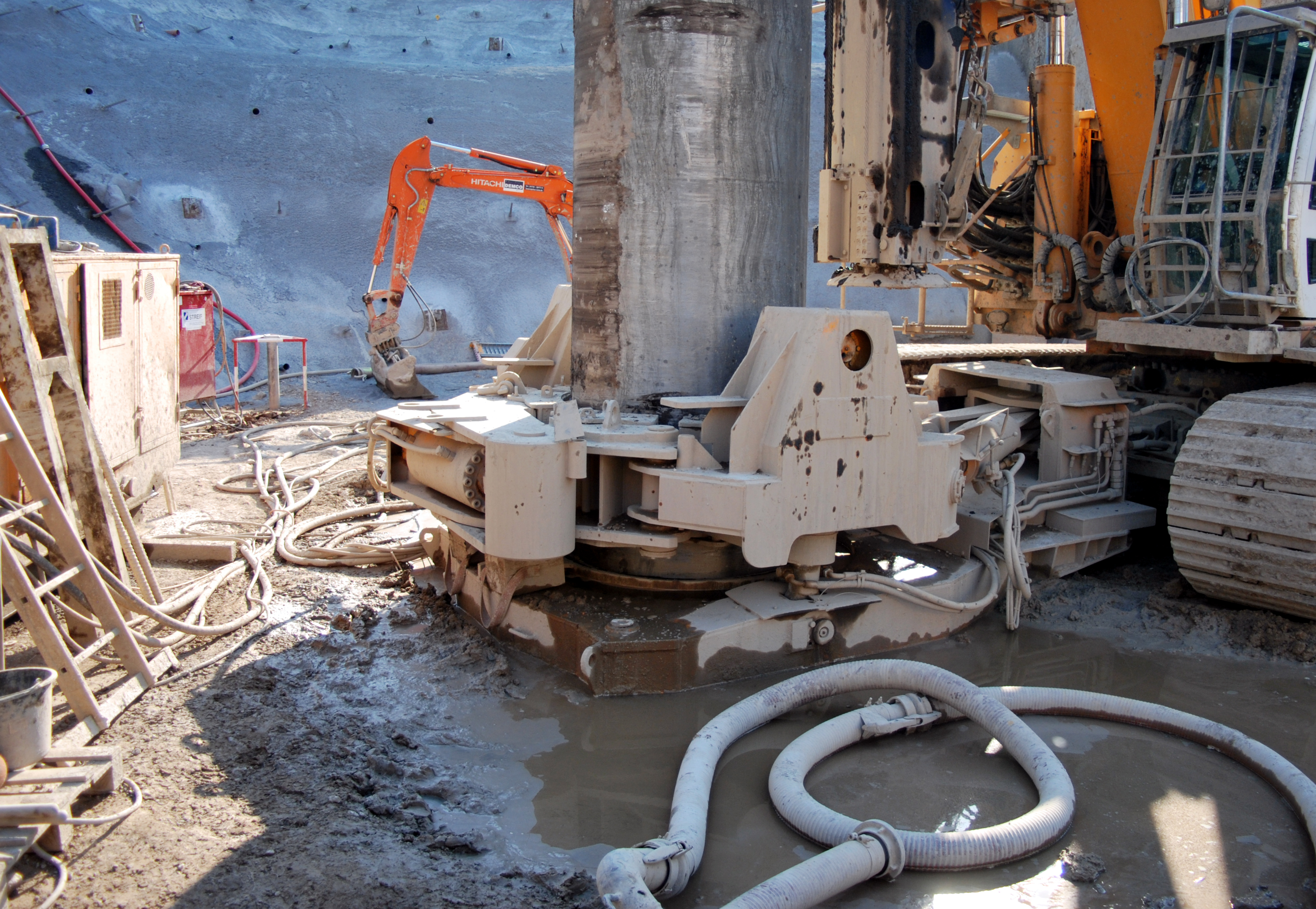 hydraulische Verrohrungsmaschine des Herstellers LEFFER während des Gebrauchs.